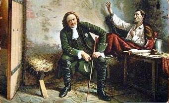 Василий Алексеевич Волков (1840-1907) — русский и украинский живописец. "Петр І посещает в тюрьме прказного гетмана Павла Полуботка в 1724 году"